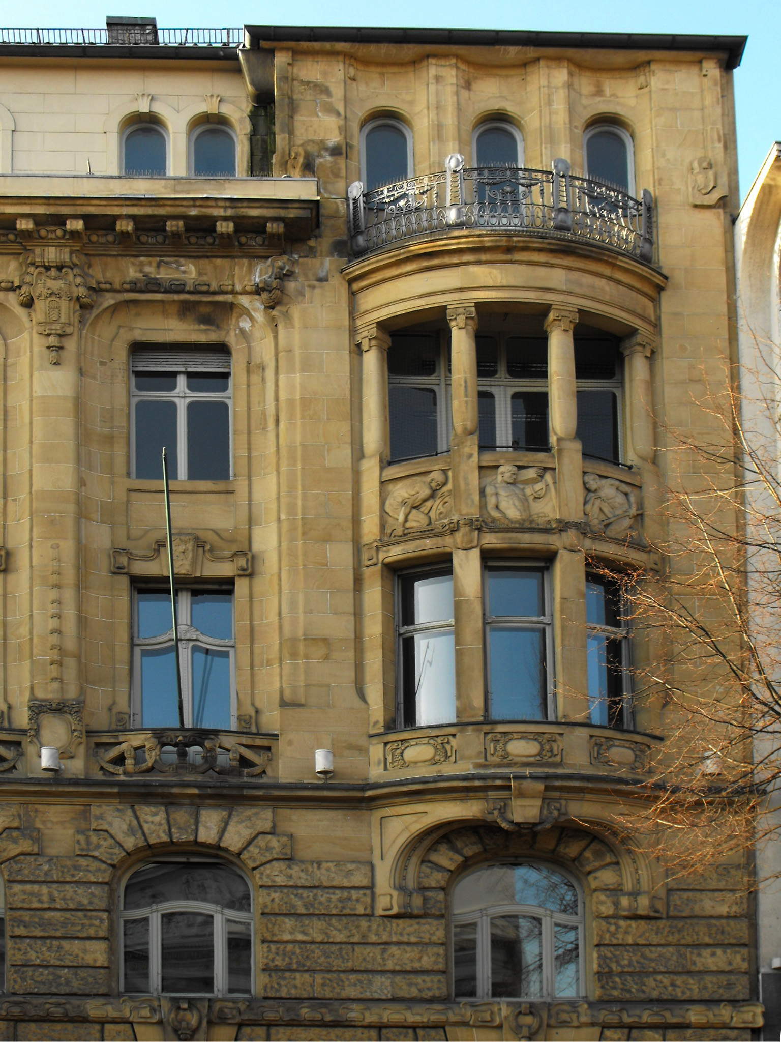 Der Erker des Bankhauses der ehem. Dresdner Bank am Kapuzinergraben in Aachen